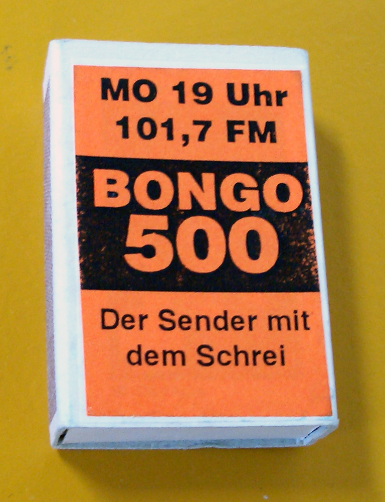 Zünder mit "Radio Bongo 500"-Ankündigung